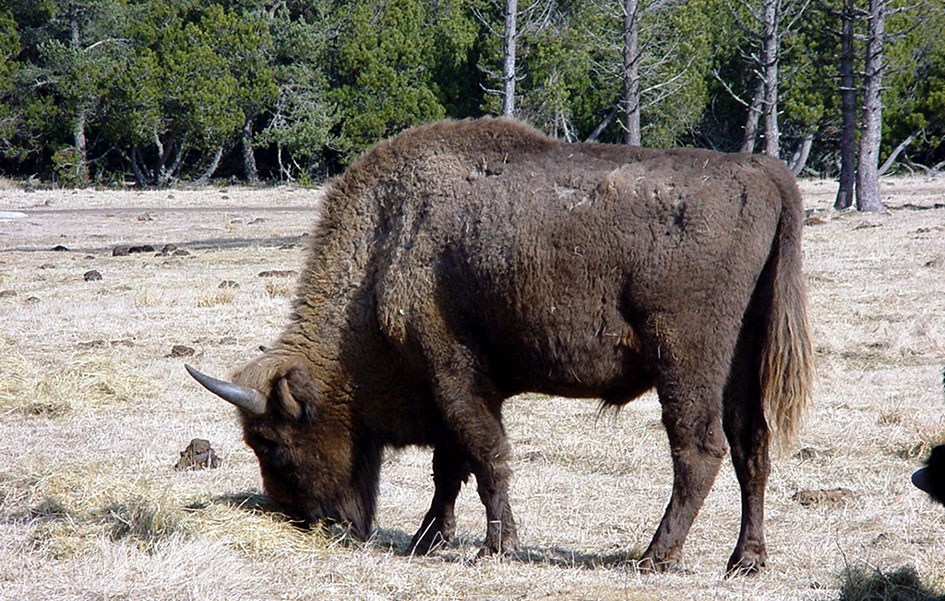 Bison d'europe, Eulalie en Margeride, France